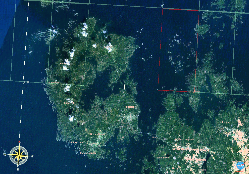 Raippaluoto